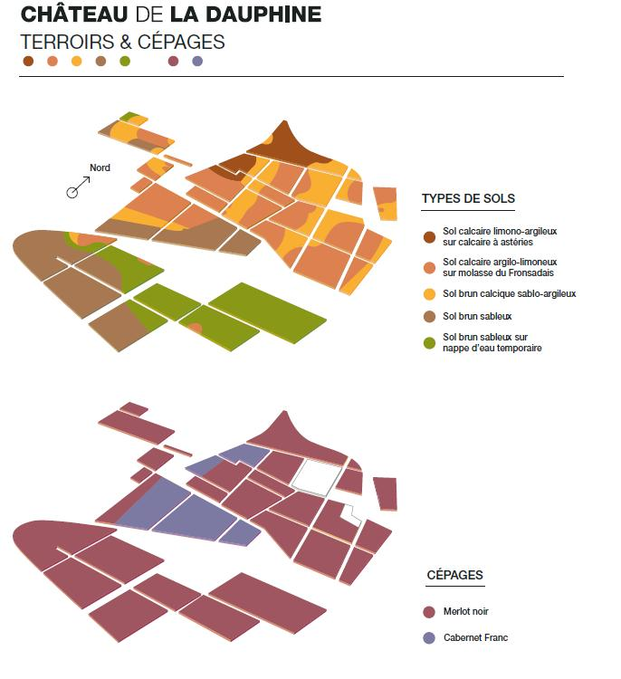 Carte présentant les différents terroir du Châteaude La Dauphine